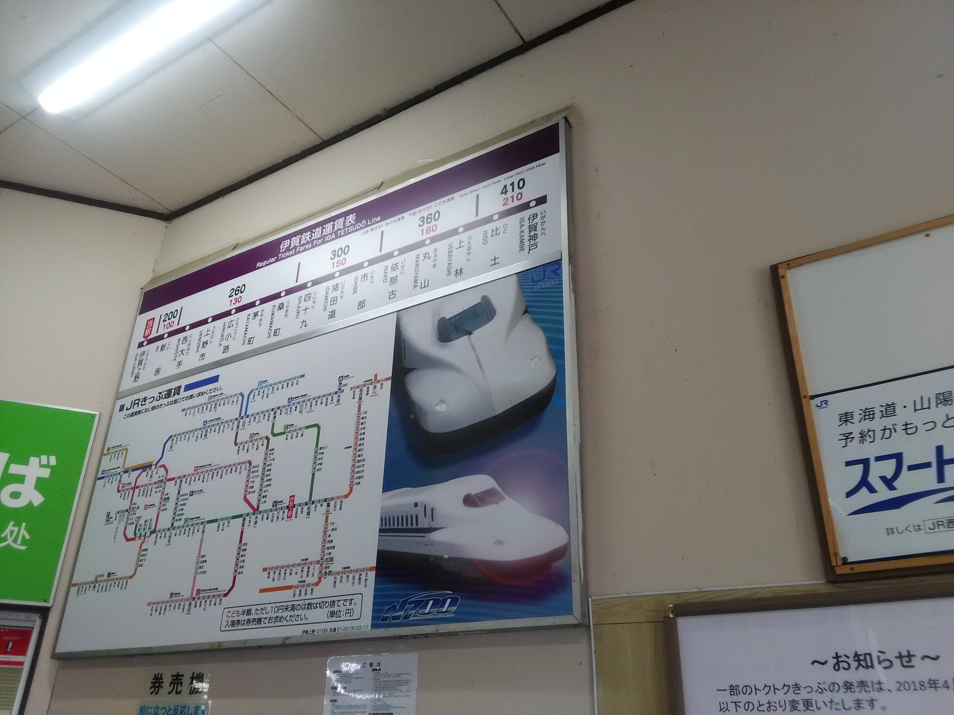 2018年3月17日時点の伊賀上野駅の運賃表。（伊賀鉄道四十九駅、JR衣摺加美北駅・総持寺駅開業後。路線記号反映。）